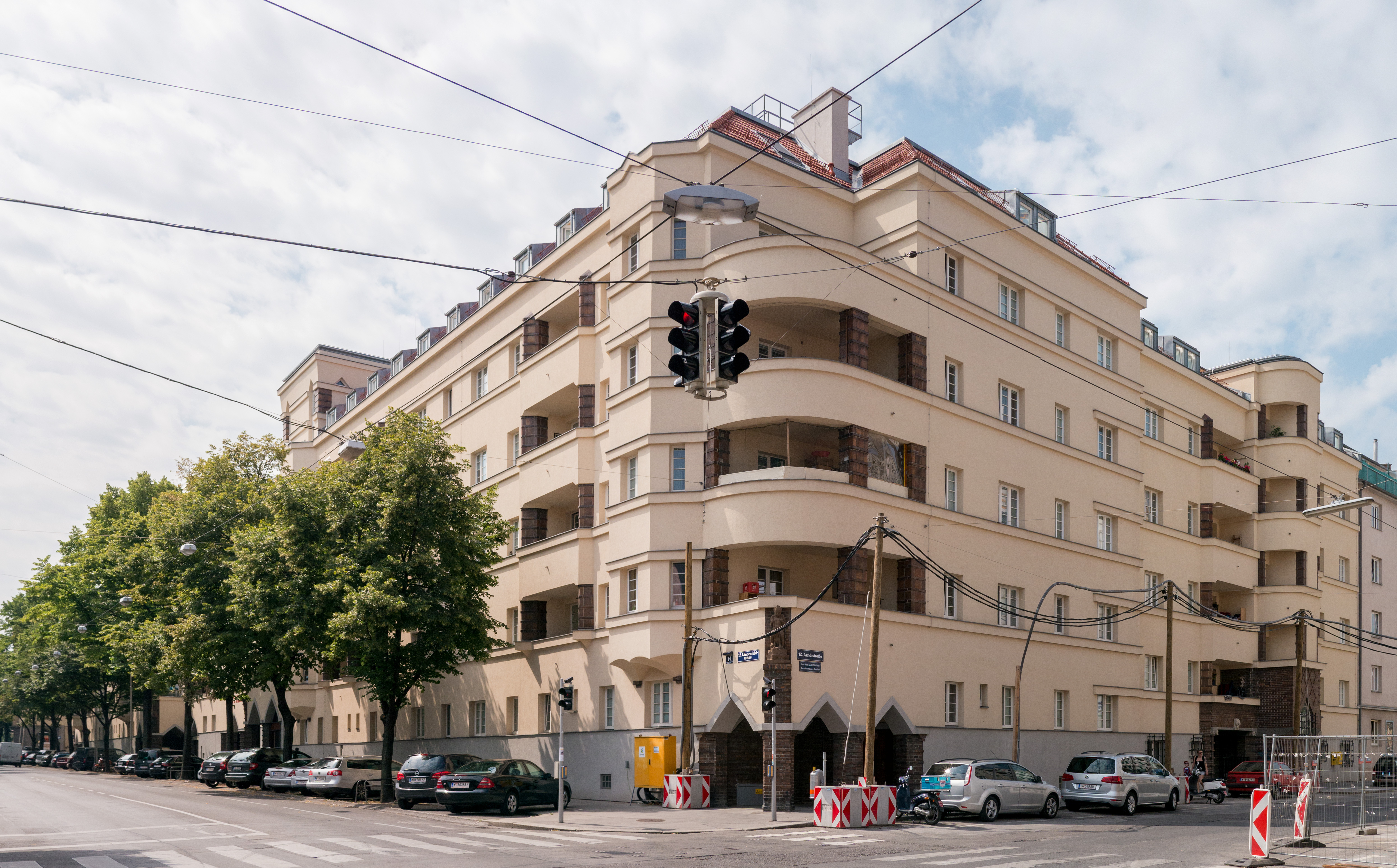 Kommunaler Wohnbau, Lorenshof